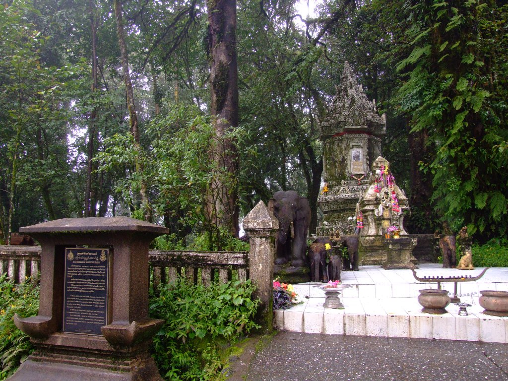 กู่พระเจ้าอินทวิชยานนท์ ยอดดอยอินทนนท์ อุทยานแห่งชาติดอยอินทนนท์